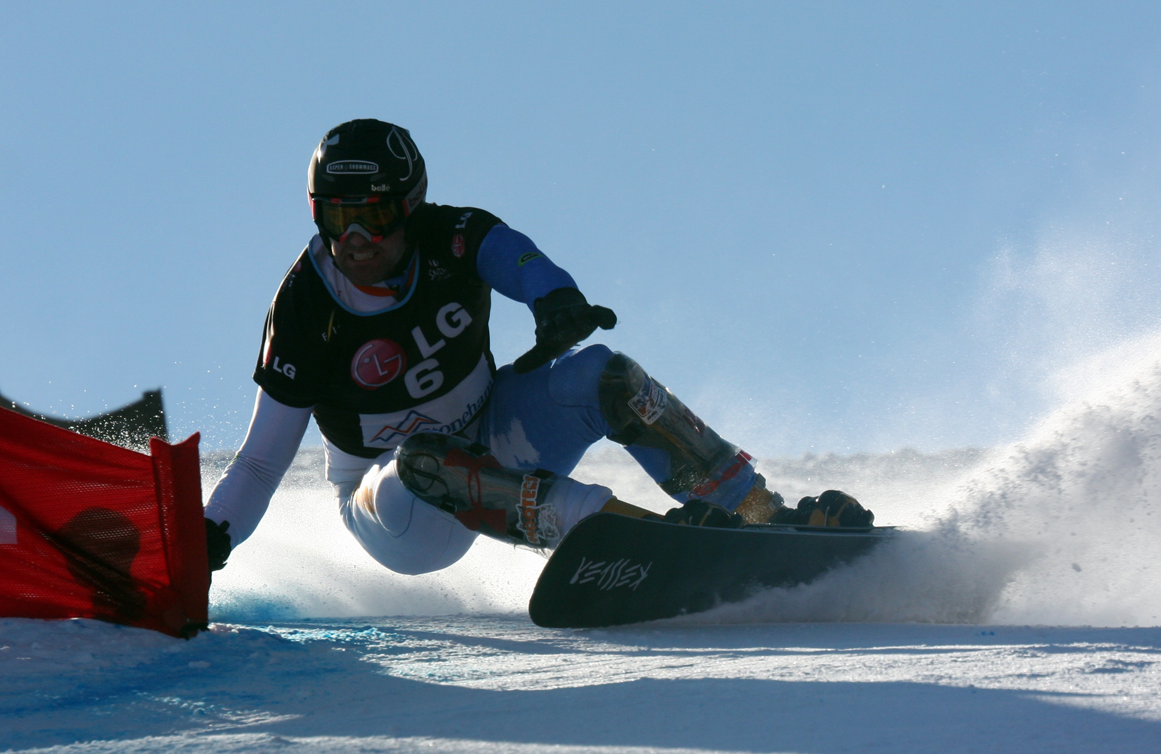 Stoneham_PGS_Christopher_Klug_USA